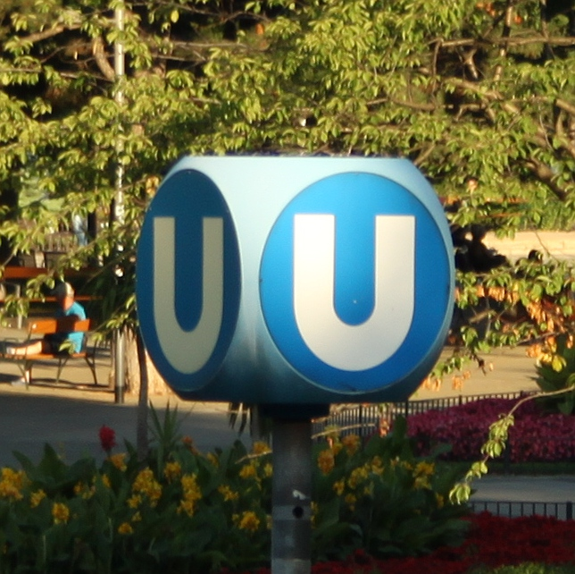 Zeichen für U-Bahn-Stationen in Wien; hier bei der Station Karlsplatz im Resselpark